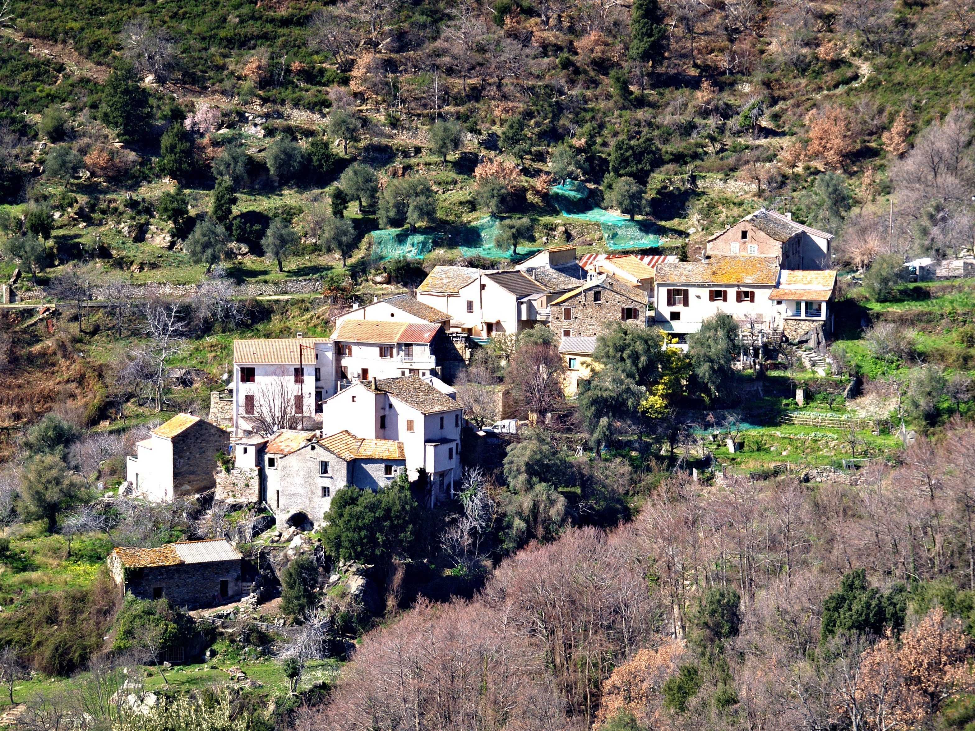 Campitello, Costere (Corse) - Hameau de Panicale